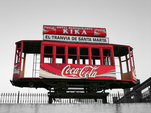 El tranvia de Santa Marta